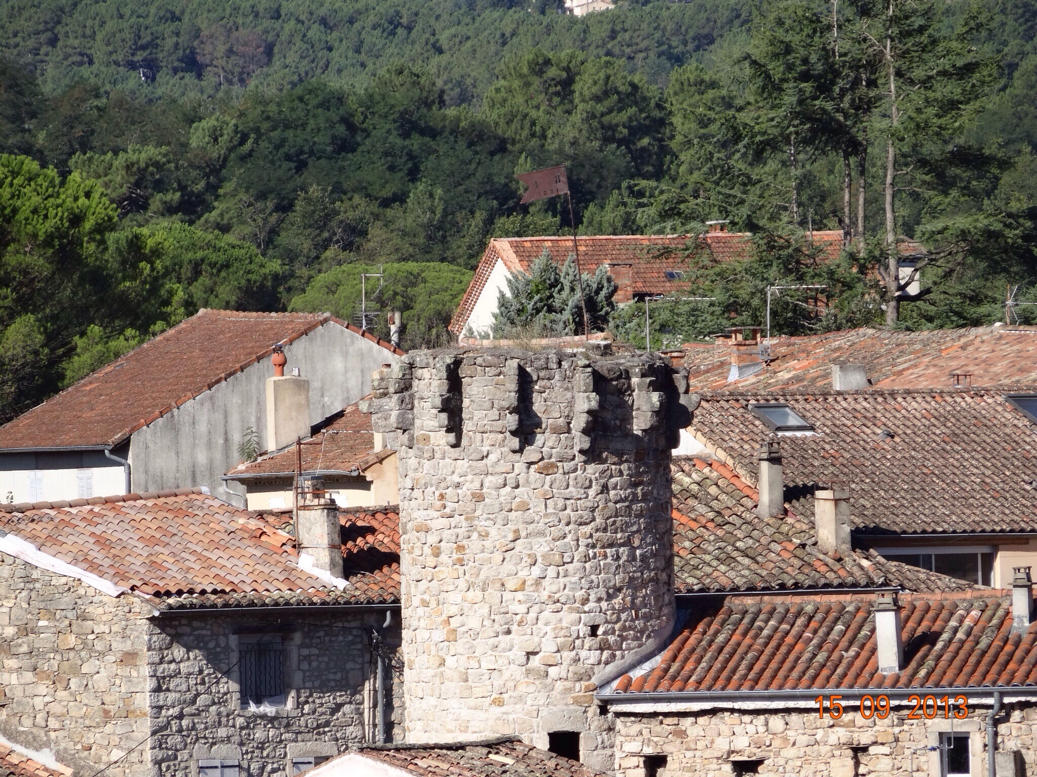 Vestige des remparts vue du clocher de Joyeuse